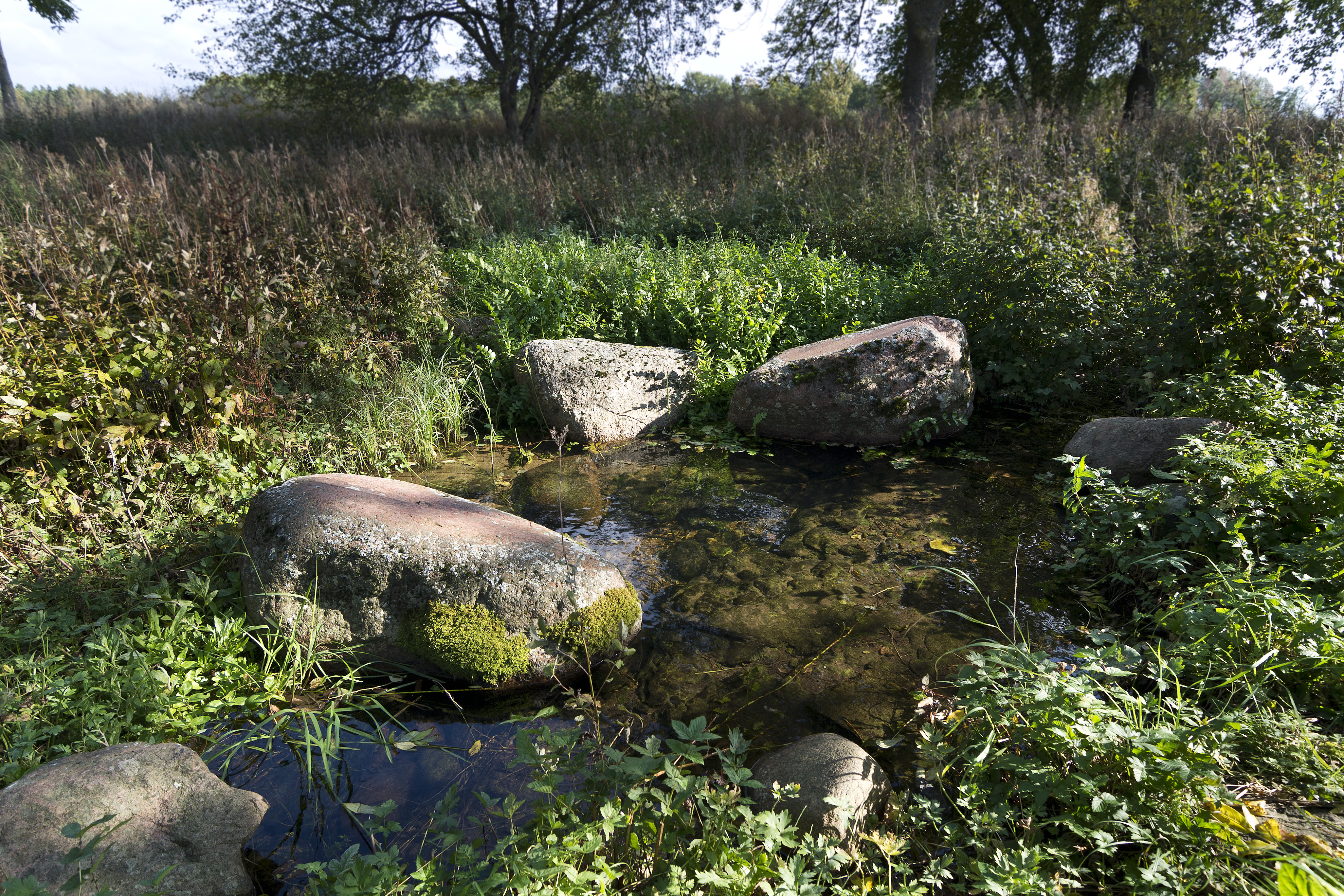 Bro offerkälla (RAÄ-nr Bro 27:5) i Bro socken, Gotlands norra härad, Gotland, Sverige.